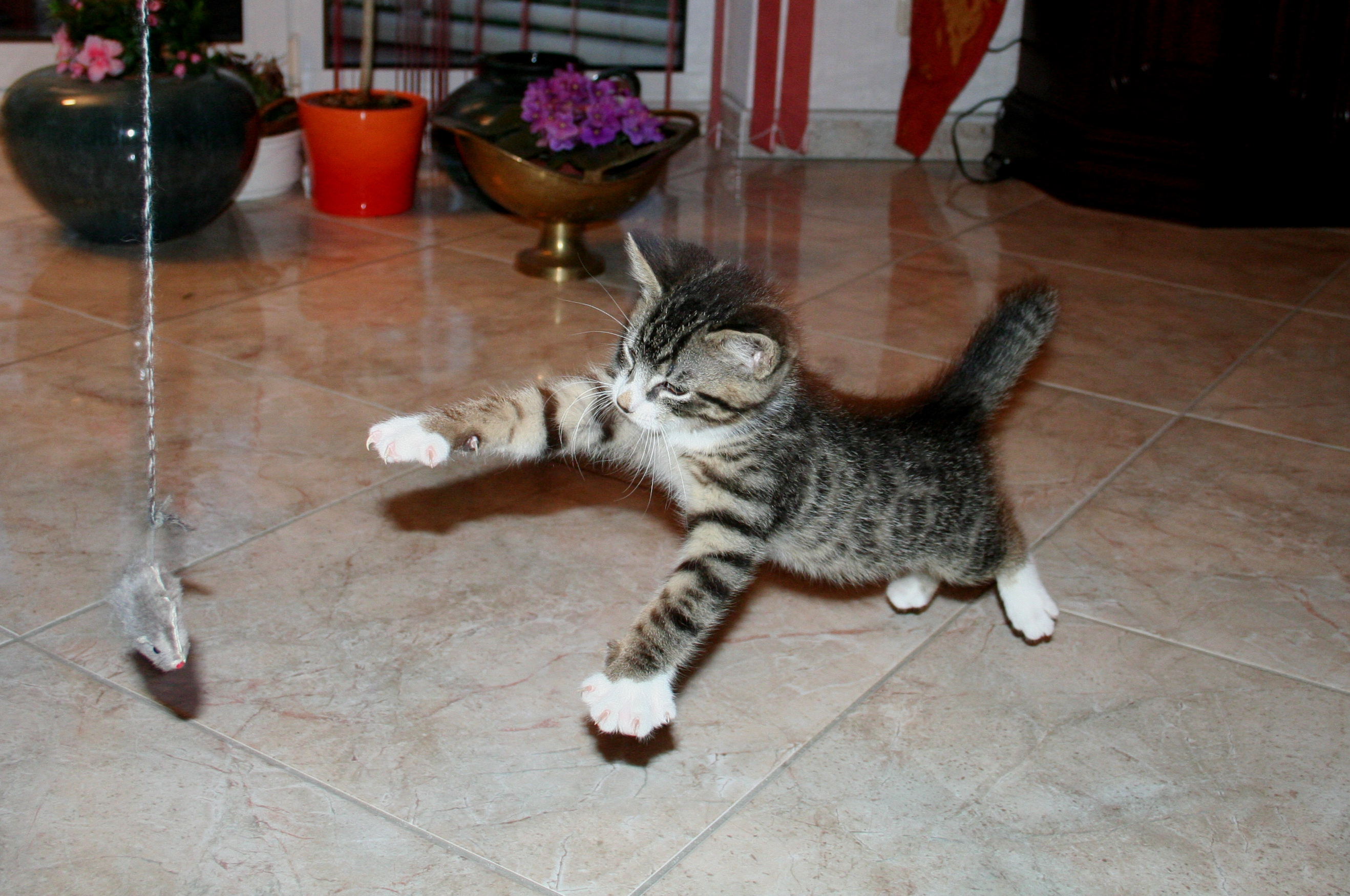 a young playing cat